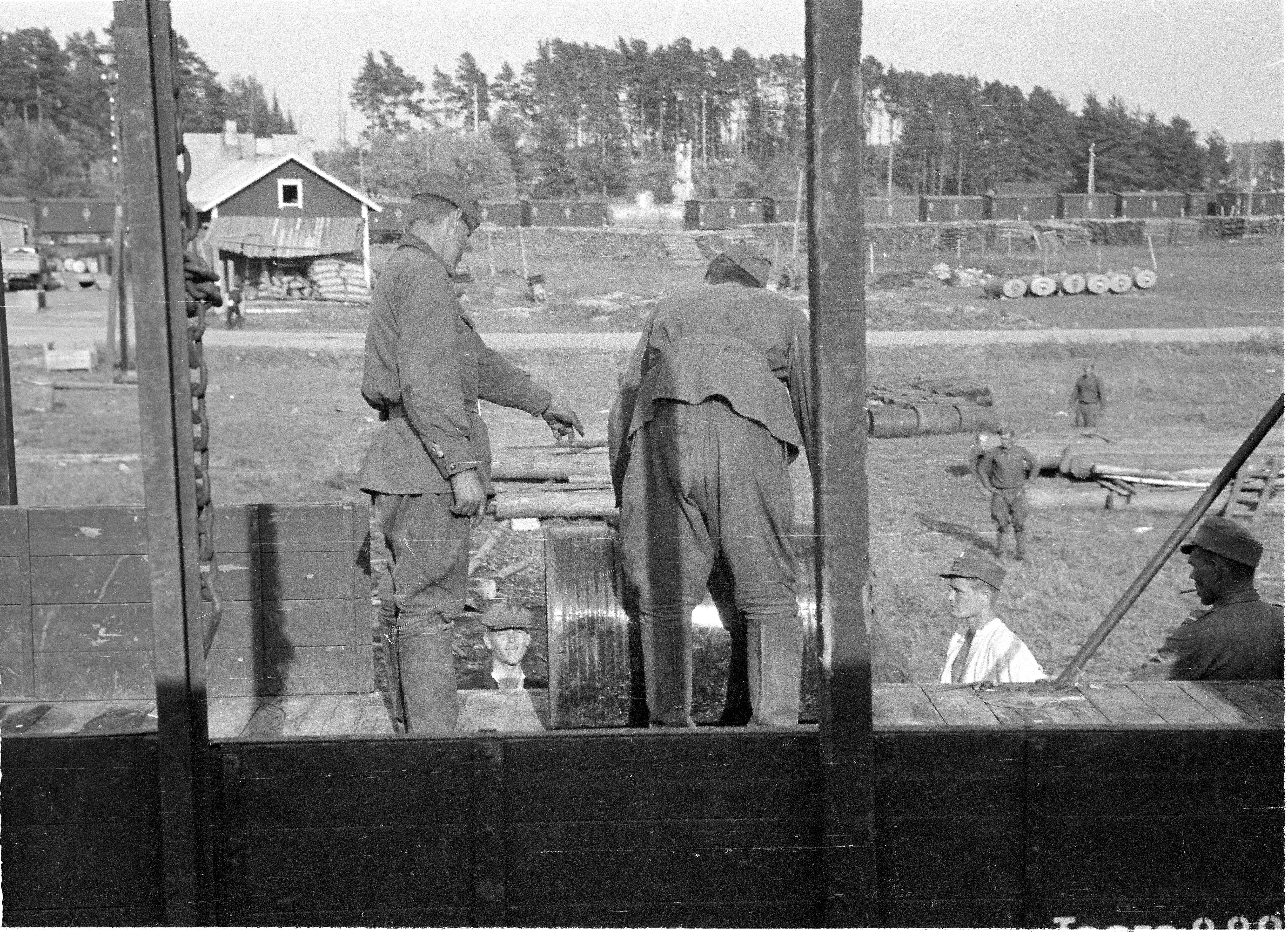 Станция Ляскеля, 6 августа 1941 год.